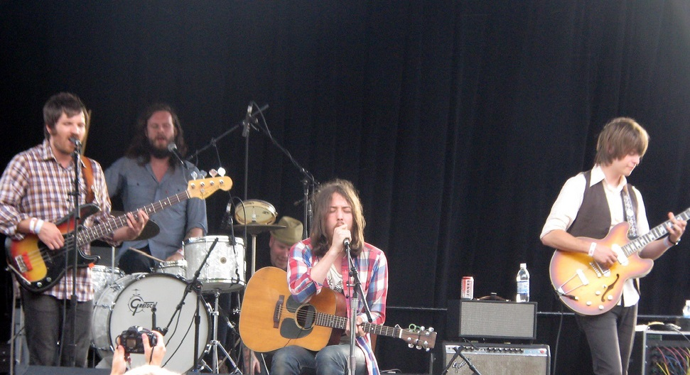 Fleet Foxes, 2008